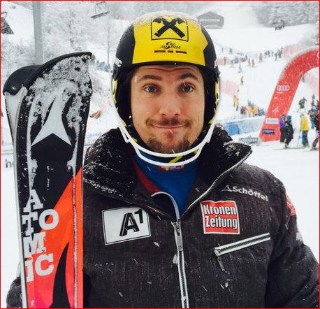 Marcel Hircher en 2014